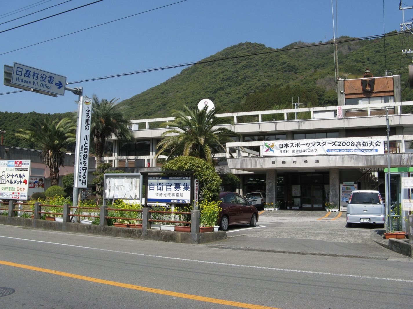 日高村役場 2008年3月25日 Bakkai撮影